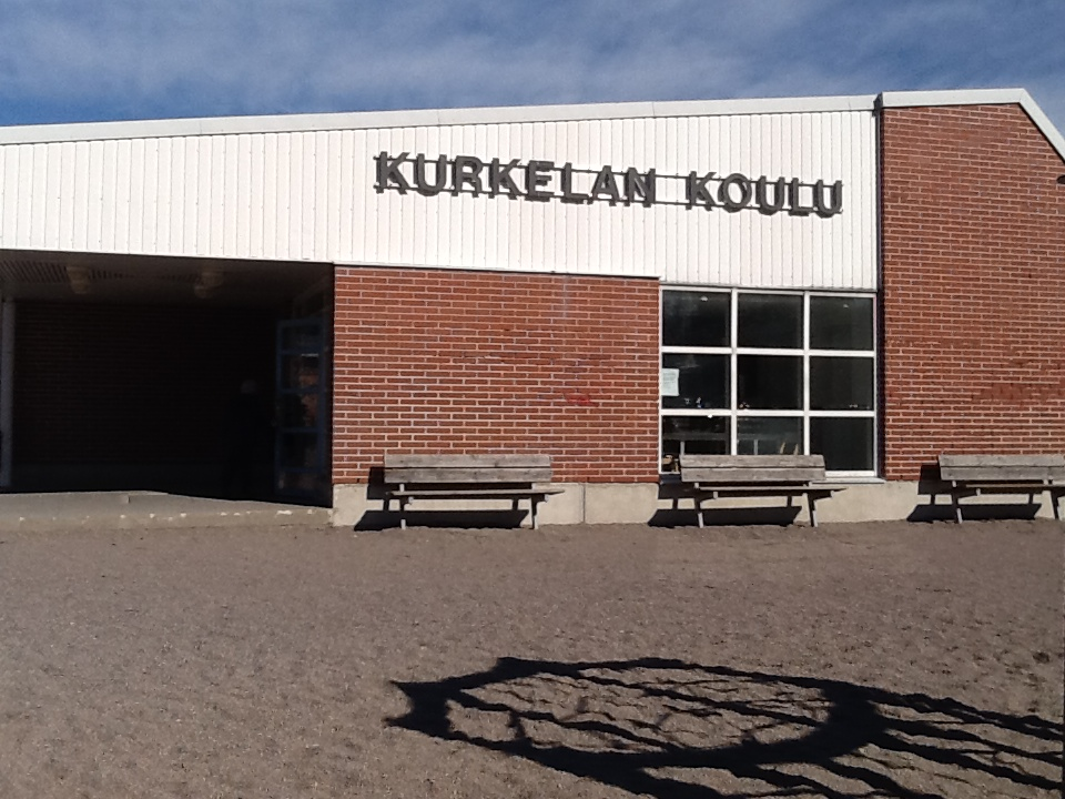 kuva Kurkelan koulusta, Keravalta